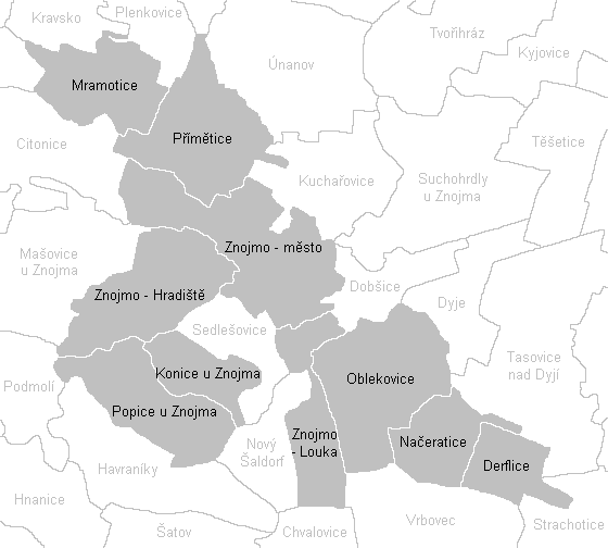 Katastrální mapa města Znojma